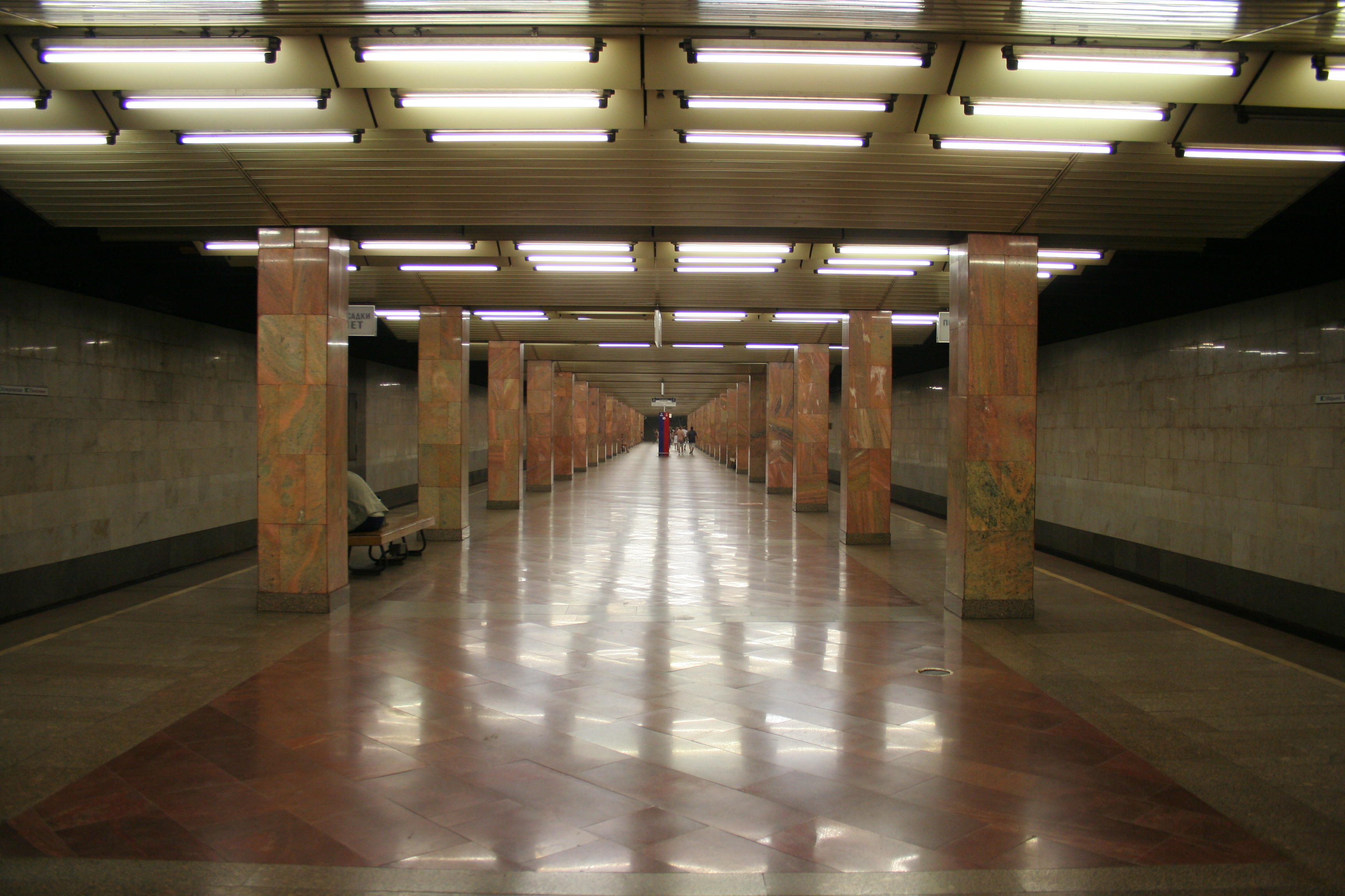 U-Bahnhof Petschatniki der Metro Moskau.